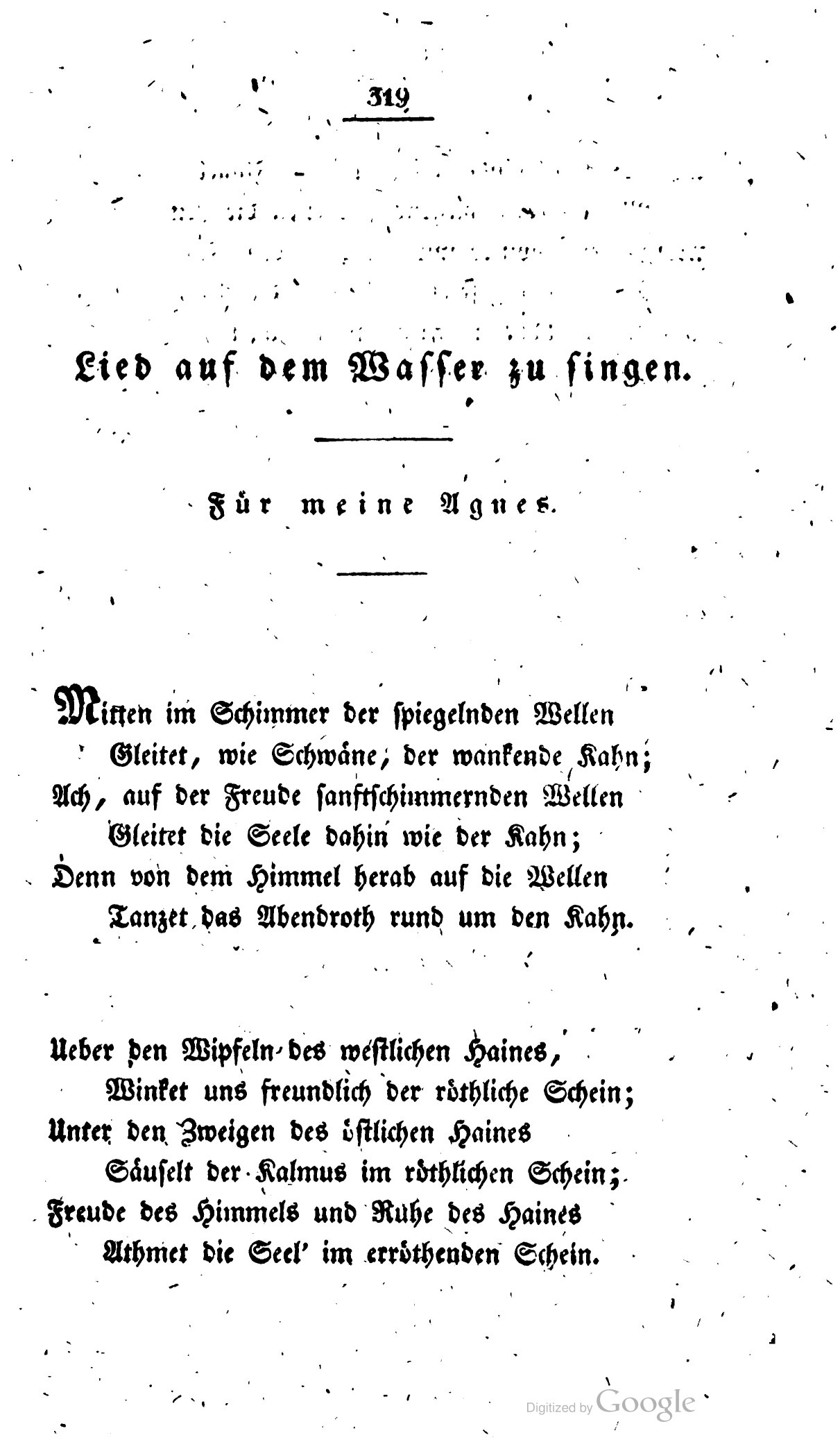 Scan from Book: Gesammelte Werke der Brüder Christian und Friedrich Leopold Grafen zu Stolberg. Erster Band. S. 319-320. Hamburg Perthes, 1827.